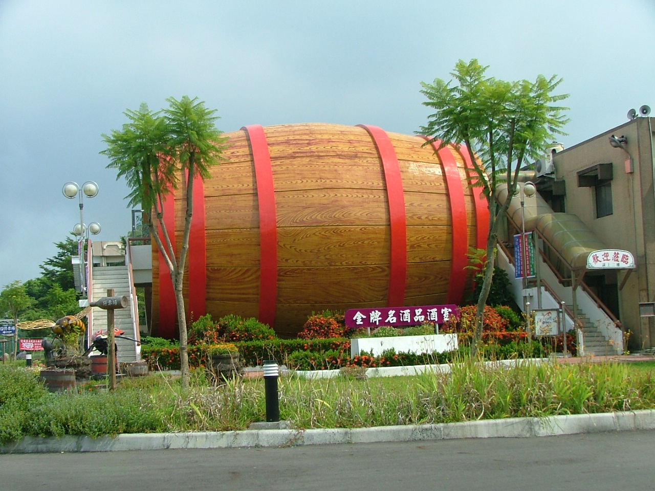 南投酒廠橡木桶造型的品酒屋